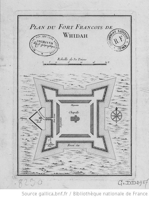 Plan du fort françois de Whidah